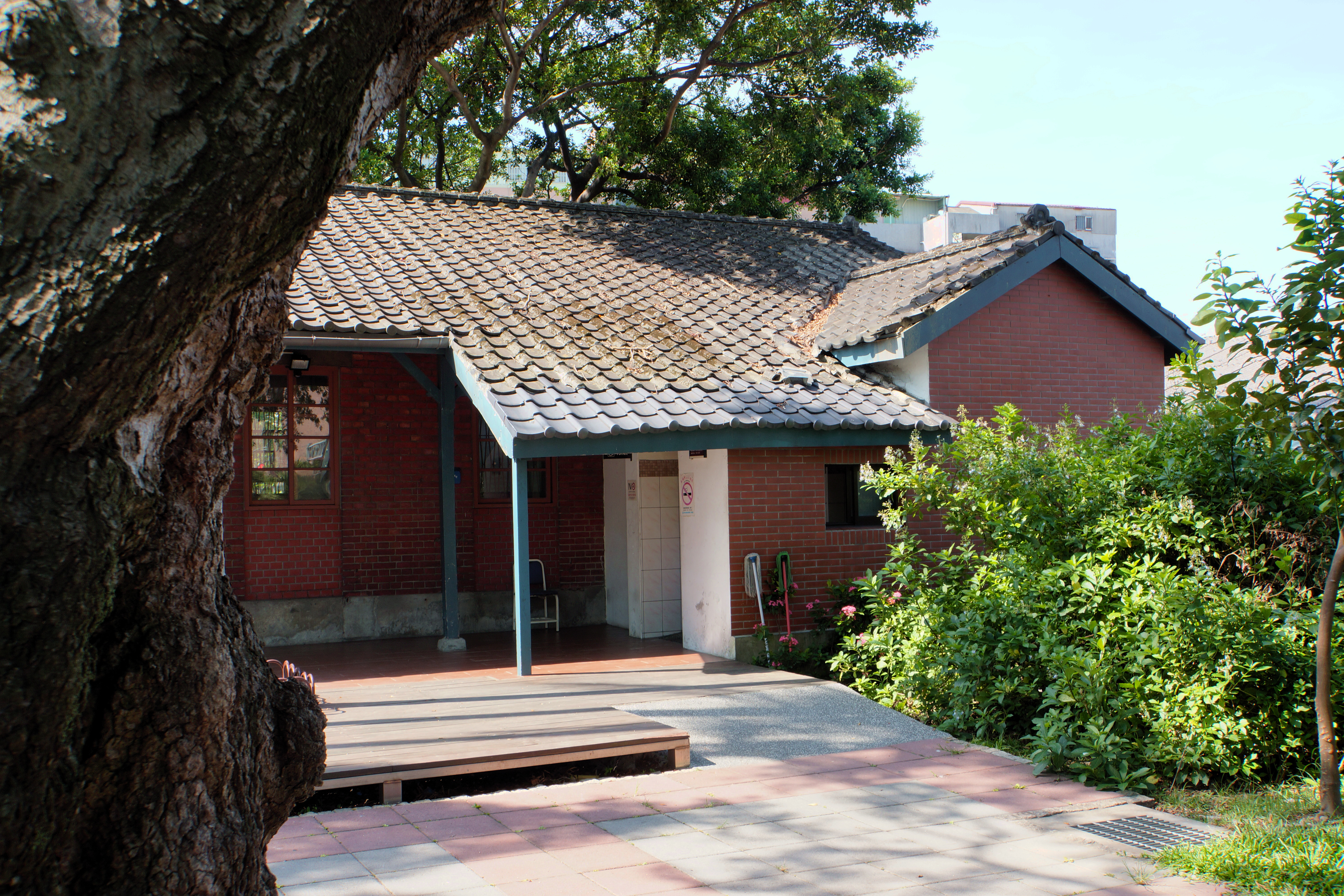 仁濟療養院 Renji Sanatorium